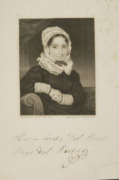 Estampa. María Teresa del Riego.